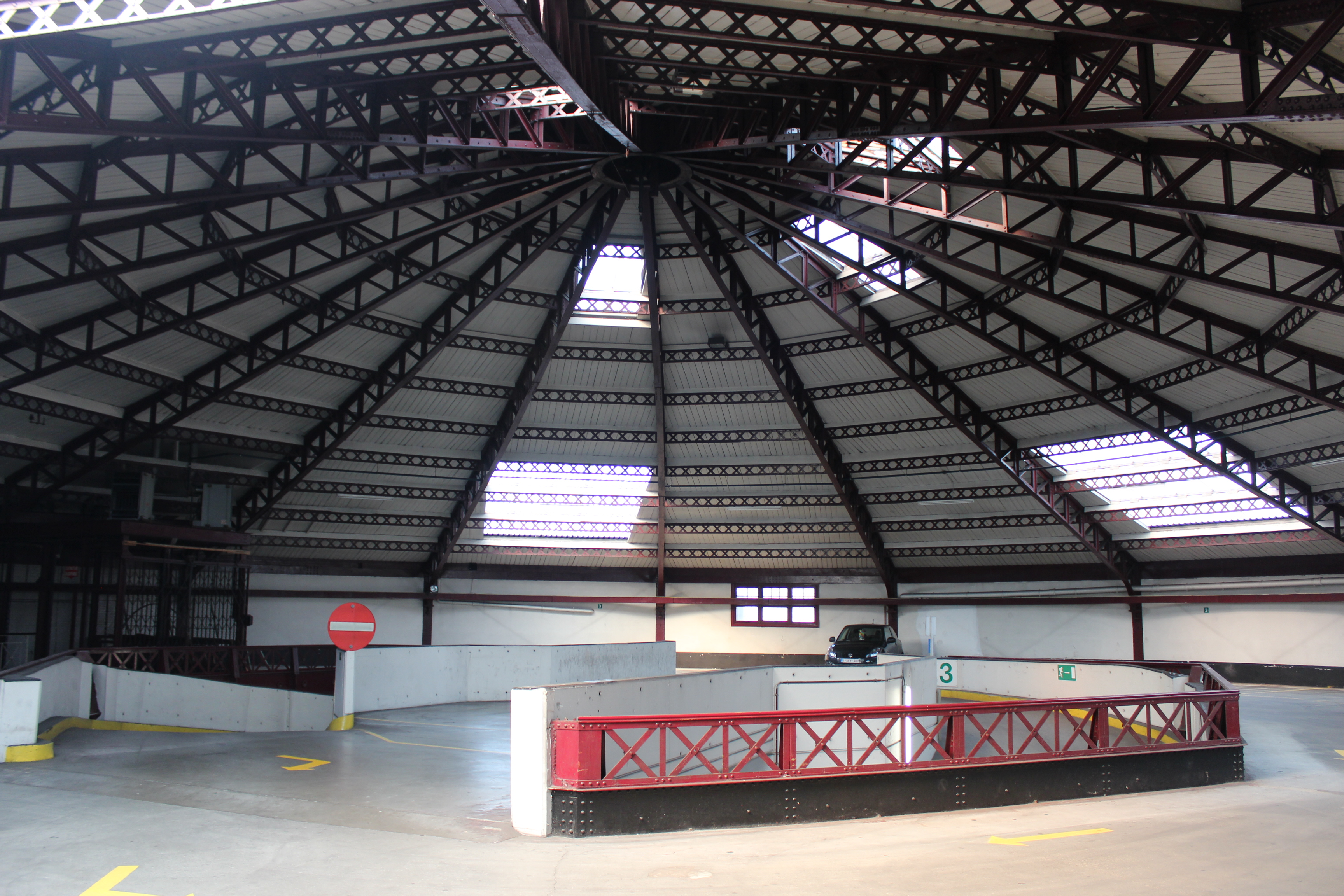 Bâtiment construit à Bruxelles, Boulevard Lemonnier 8-14, en 1879 sur le plans de l'architecte belge Henri Rieck et qui exposait une peinture monumentale circulaire appelée panorama. L'exploitation s'arrêta en 1924. Le bâtiment sert aujourd'hui de parking.